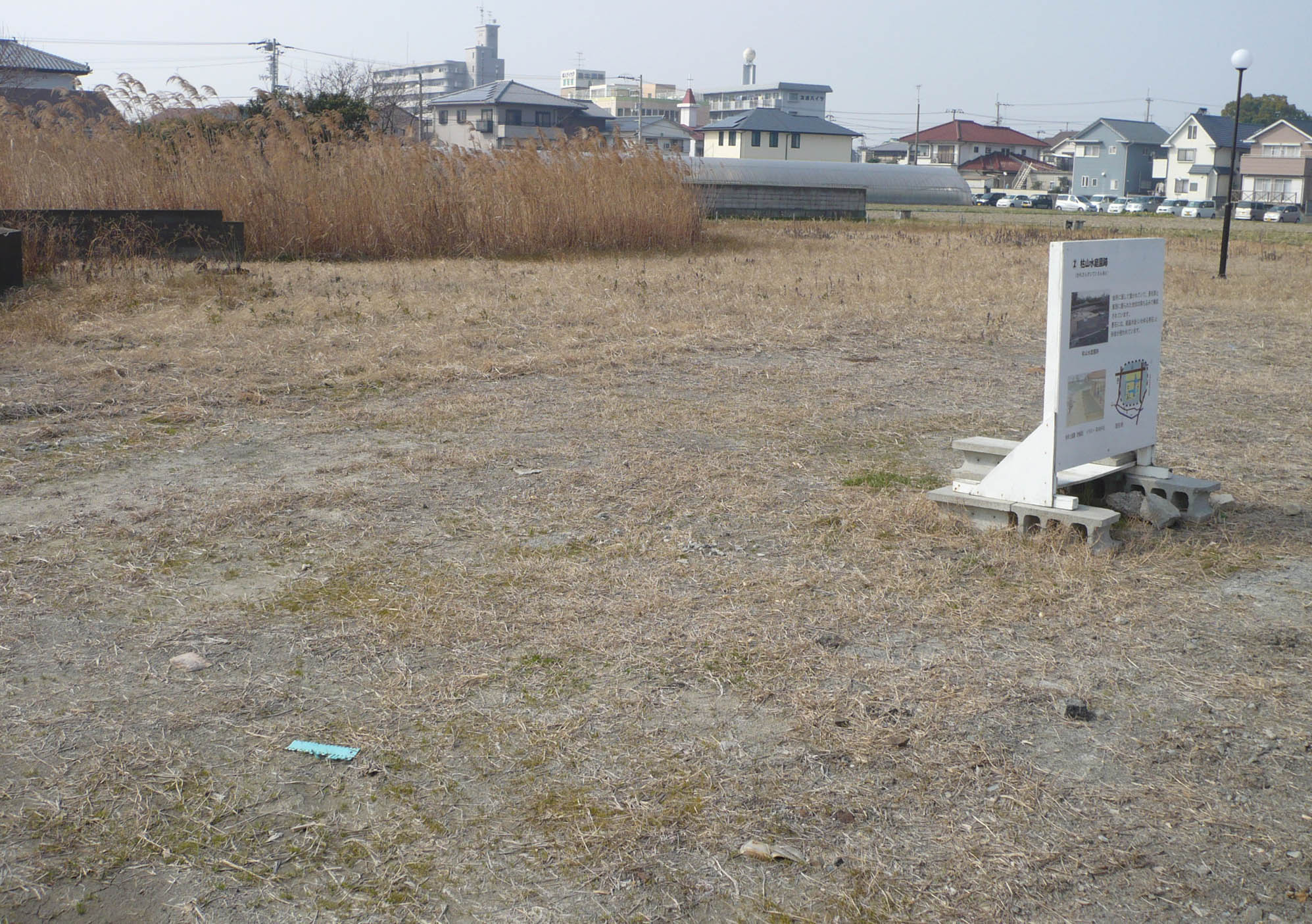 枯山水跡